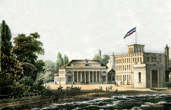 Heiligendamm um 1840 Salon und Badehaus, colorierter Stahlstich